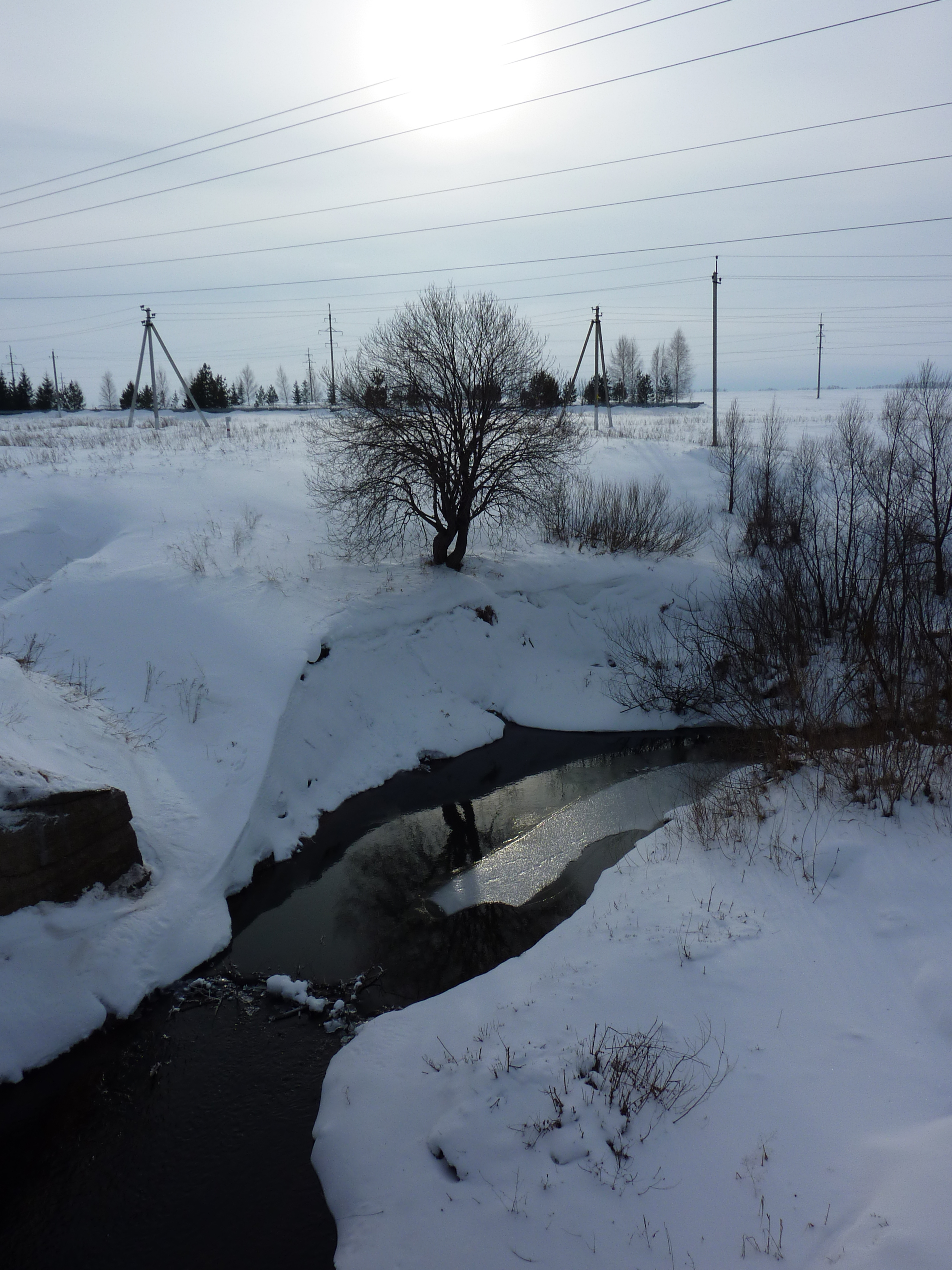 река Студенец